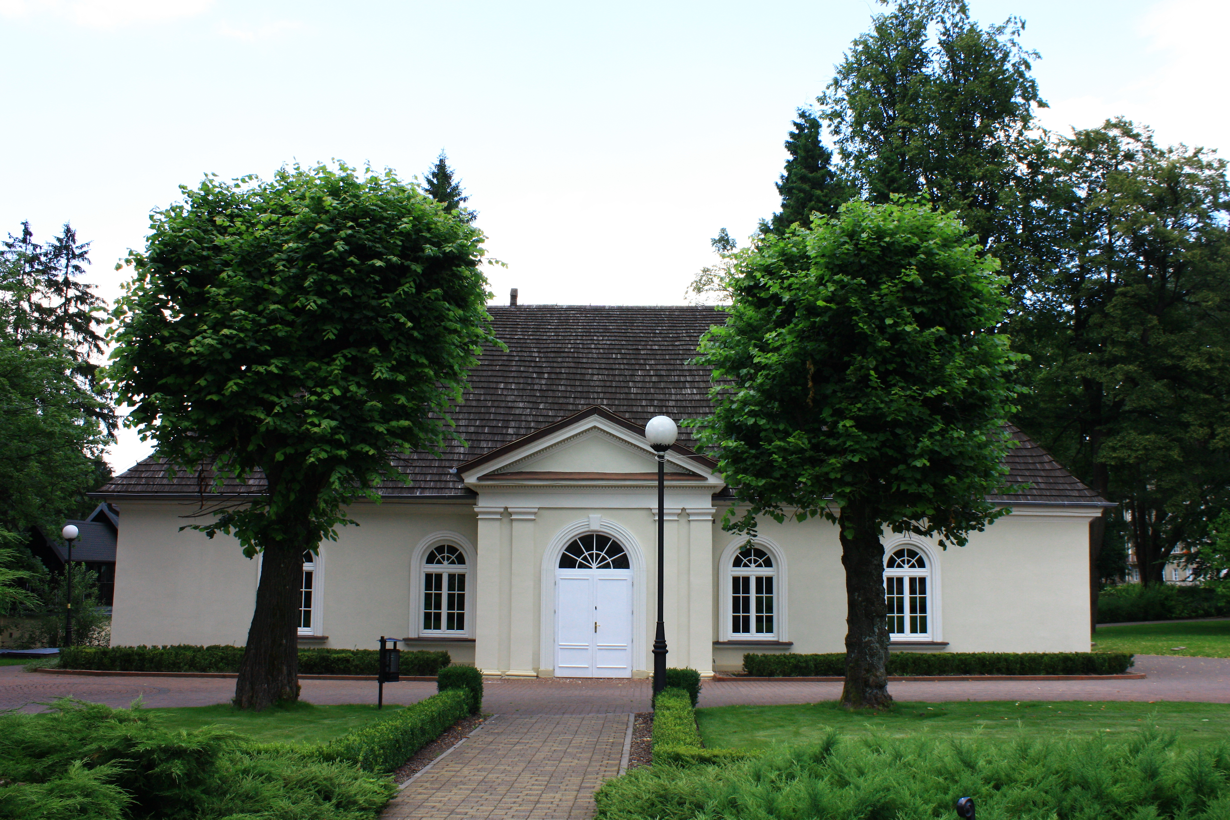 Duszniki-Zdrój, teatr im. F. Chopina, XIX